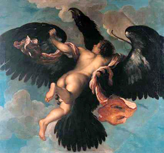 ? × ? cm